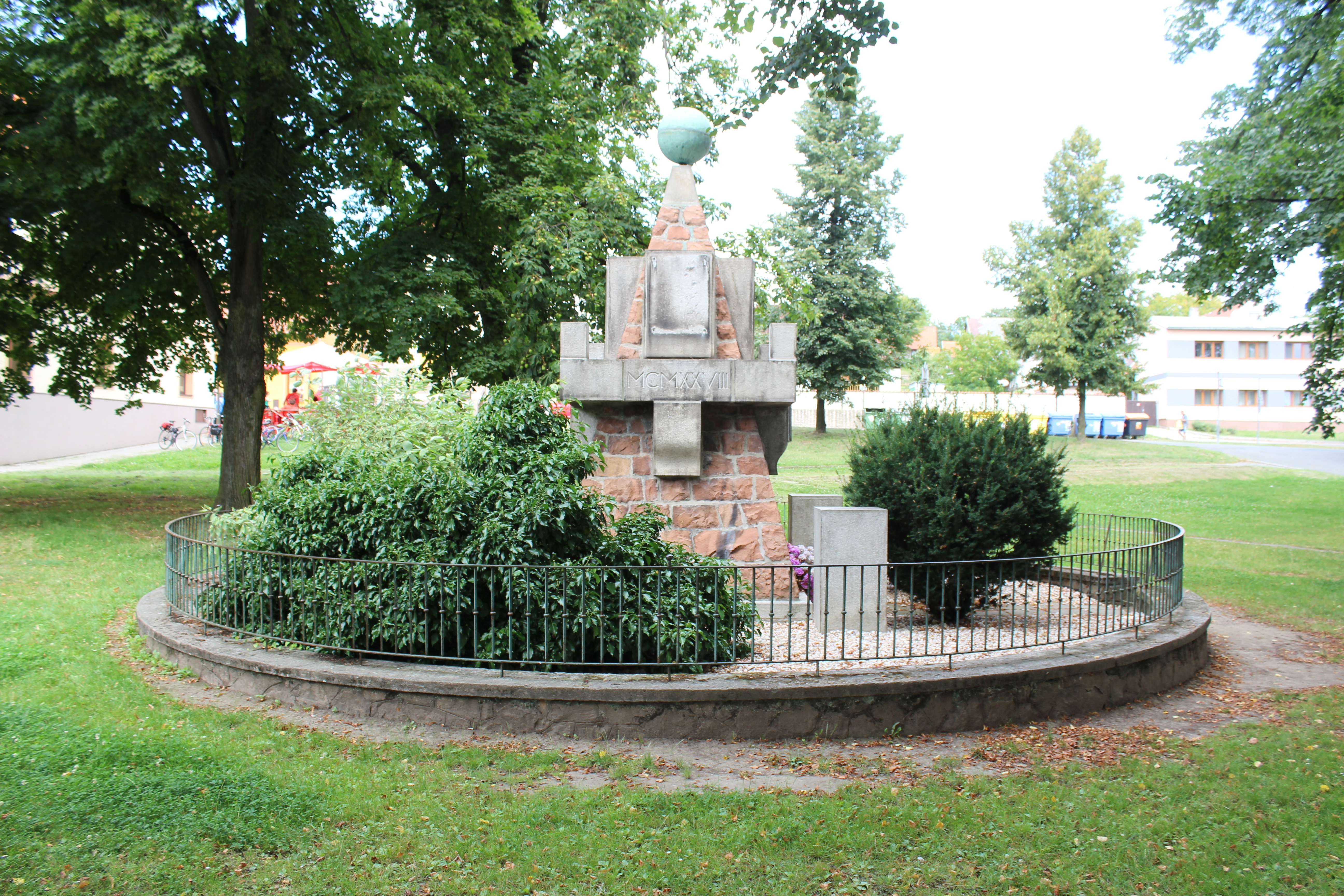 Ondřejov je známý především svou hvězdárnou a pracovištěm Astronomického ústavu AV. Na náměstí vás zaujme pomník padlým odhlaený v roce 1928 k 10. výročí ČSR. Autorem návrhu je architekt Otto Rothmayer. Pomník prozrazuje, že autor byl žákem Josipa Plečnika, architekta úprav Pražského Hradu.